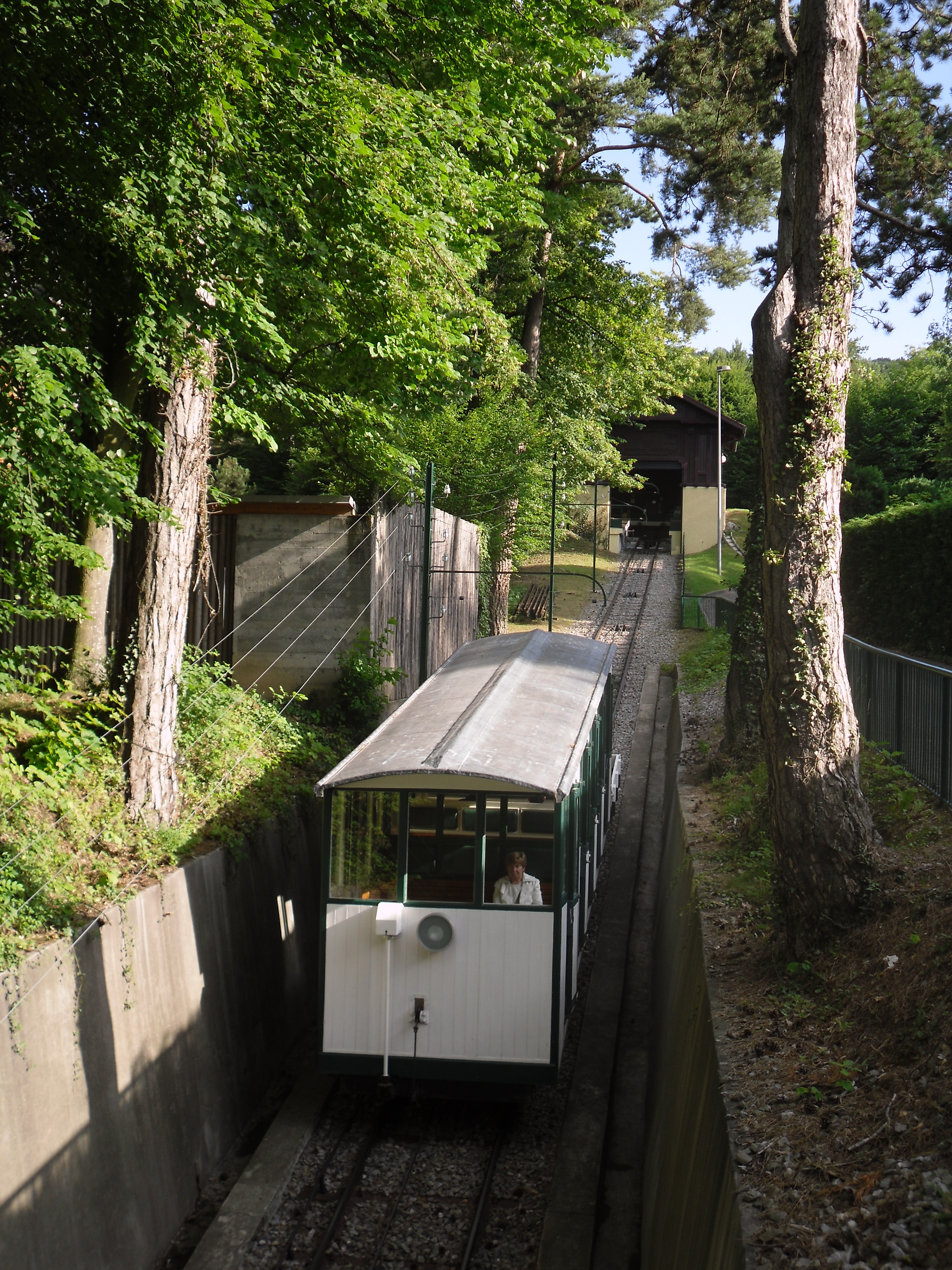 Départ du Funiculaire d'Evian de la Gare amont